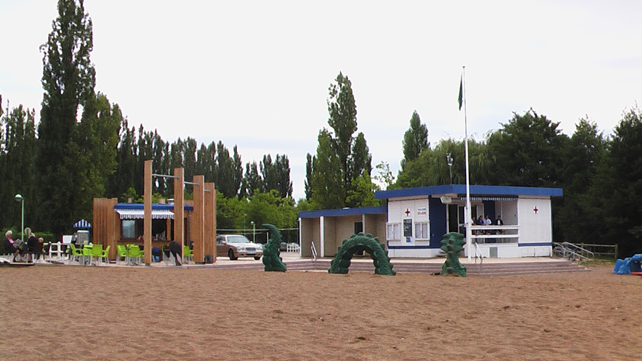 Poste de surveillance de baignade du lac Kir, à l'occasion de l'opération Dijon Plage. Devant, des jeux pour enfants, et un snack-bar.